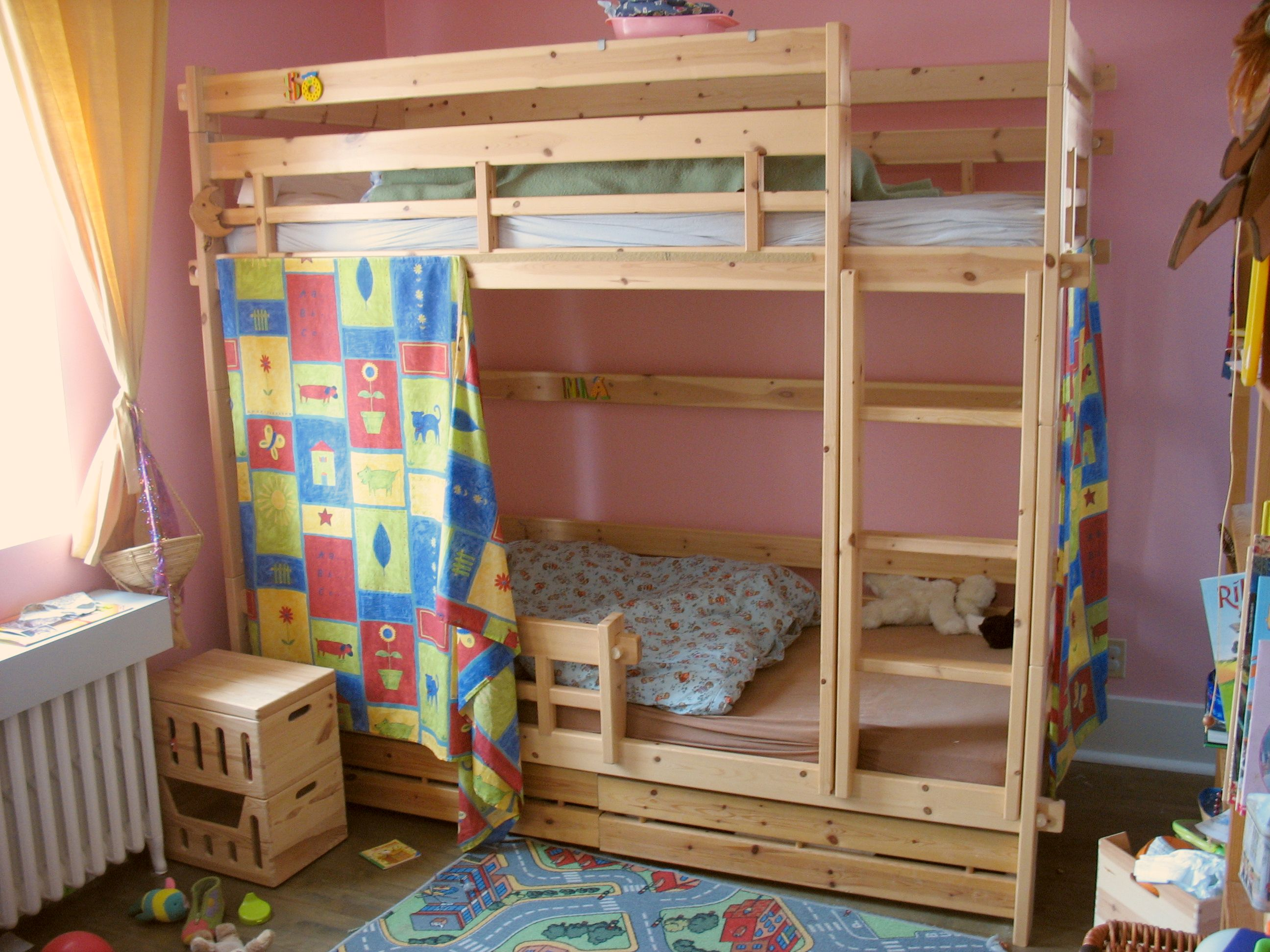 Bunk bed